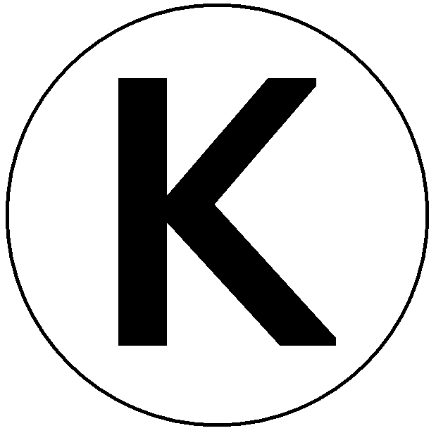 Markering voor klettersteigkarabiners.